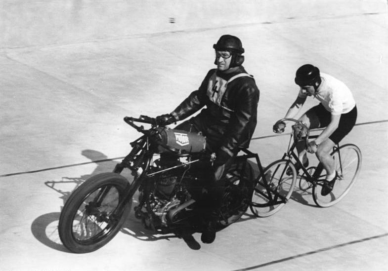 Schondorf, Ronny Maraun Zentralbild Wendorf 23.9.1956 Bey-Sch. DDR-Meister Bruno Zieger siegte Bei einer Veranstaltung auf der Radrennbahn in Berlin-Weißensee blieb der DDR-Meister Bruno Zieger am Sonnabend, den 22.9.1956, ein weiteres Mal erfolgreich. Er schlug Maraun, Tschorn, Barandat, Jährling, Elste und Grigat. Auch im 10-km-Verfolgungsfahren gab er Maraun mit 20 m das Nachsehen. UBz:Im 10-km-Verfolgungsrennen wurde der Berliner Maraun nur knapp von Zieger geschlagen, nachdem er lange Zeit in Führung gelegen hatte, Maraun hinter seinem Schrittmacher Schondorf während der Fahrt.